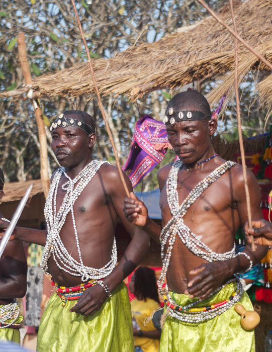 Groupe de danse patrimoniales de Ngaoundéré. Les parures et costumes des danseurs du Labi Mboum-Pana accrochent le regard du spectateur.